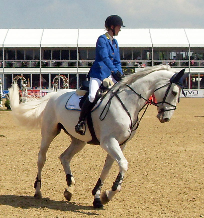 50. Maimarkt-Turnier, Judy-Ann Melchior mit As Cold as Ice Z